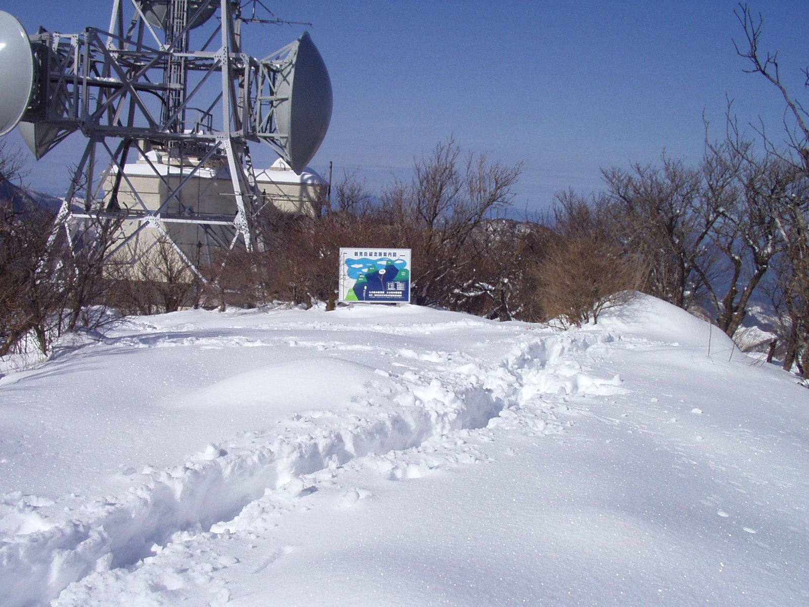 晩冬の鶴見岳山頂。